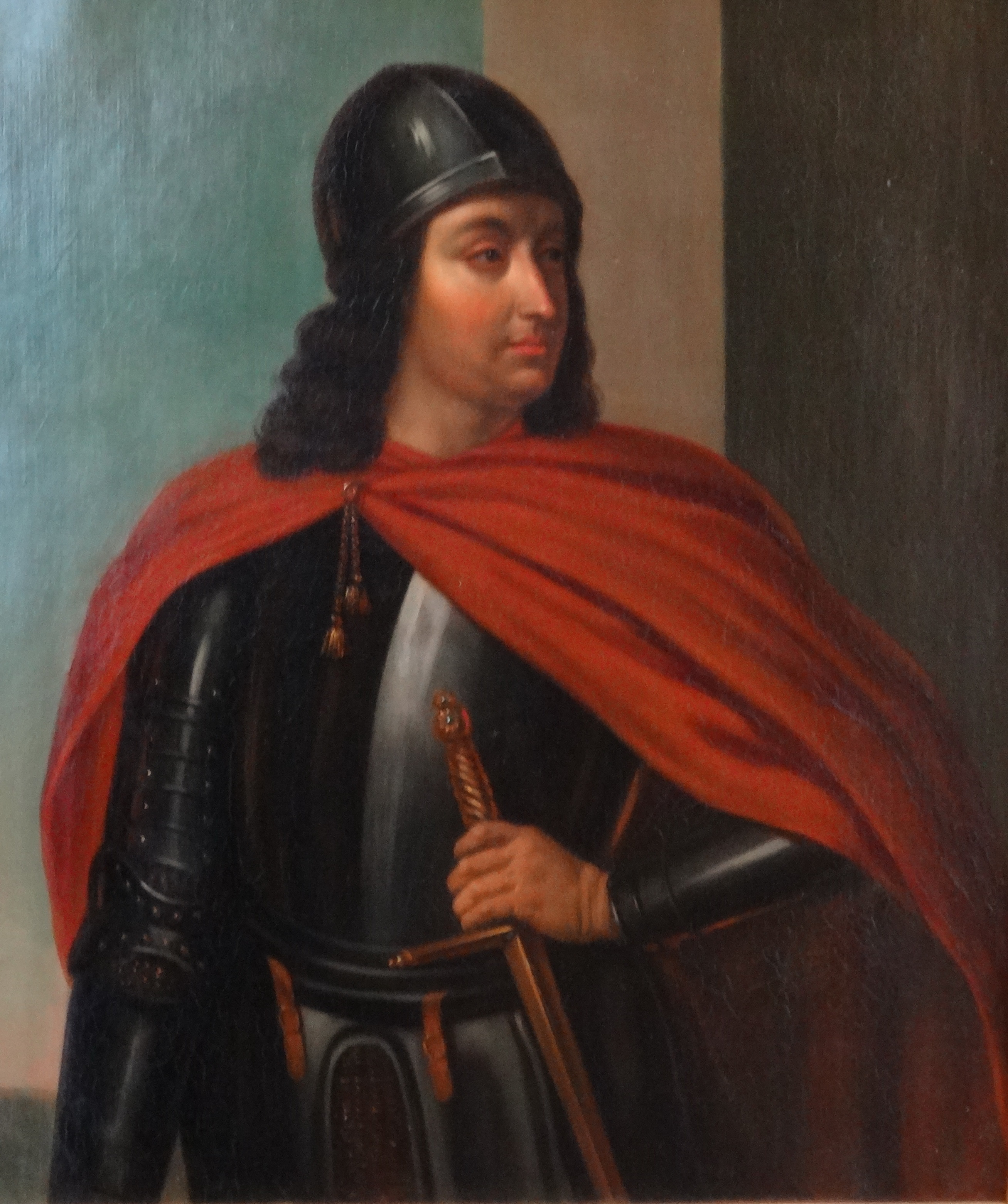 Портрет выполнен с оригинала, хранившегося прежде в коллекции мадемуазель де Монпансье в шато д'Э, по заказу короля Луи-Филиппа для Исторического музея Версаля в 1839 году.